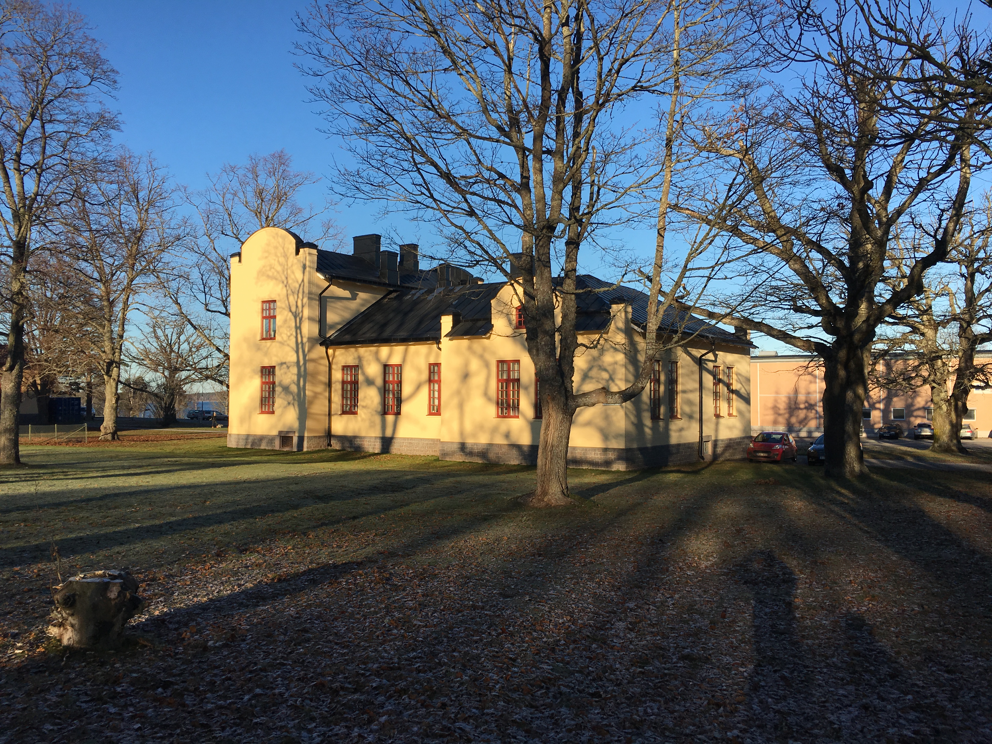 Psykiatriska museet i Gertrudsvik